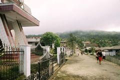 gereja kumelembuai